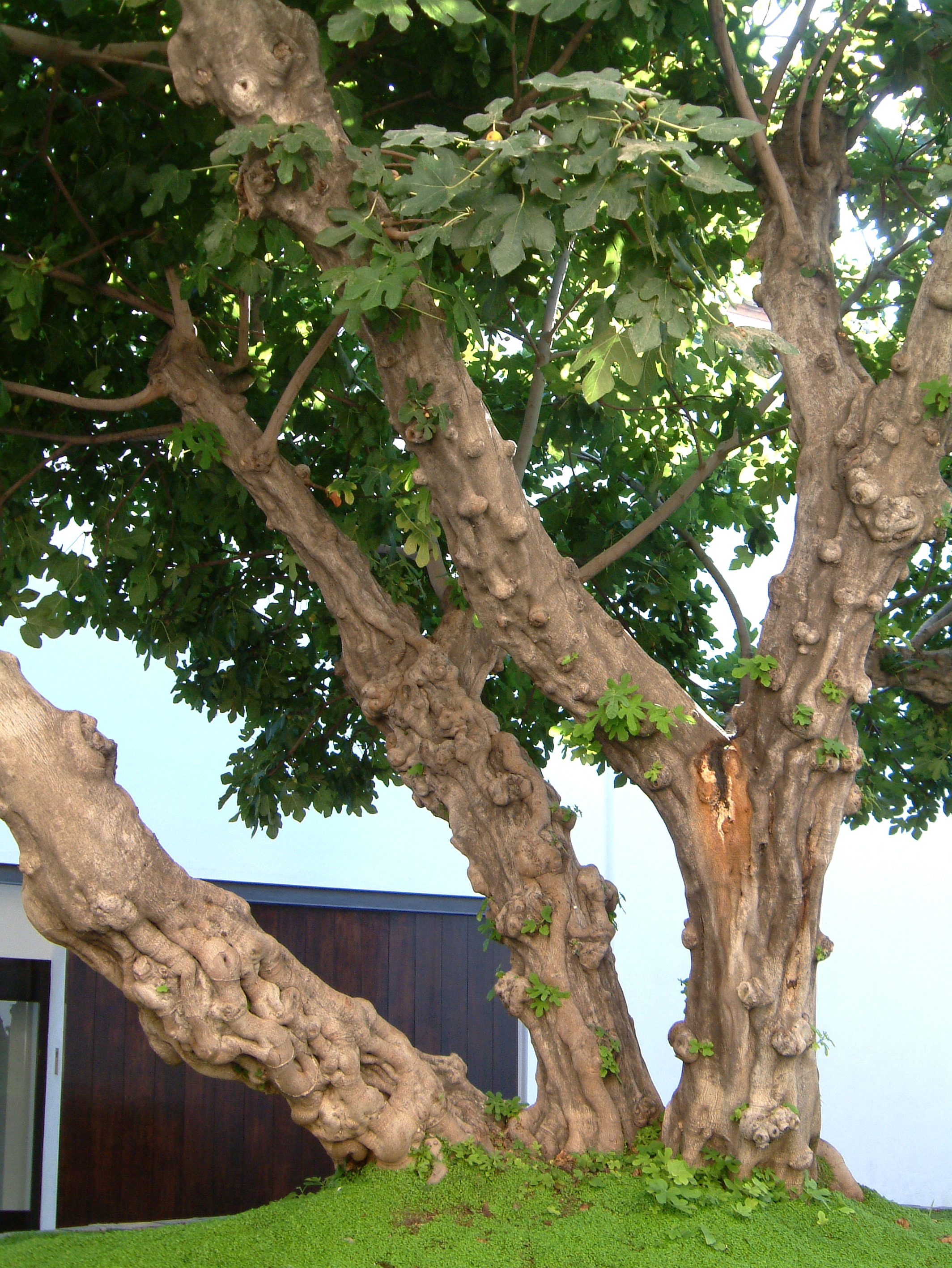 Ficus carica, Málaga: Am Picasso-Museum.